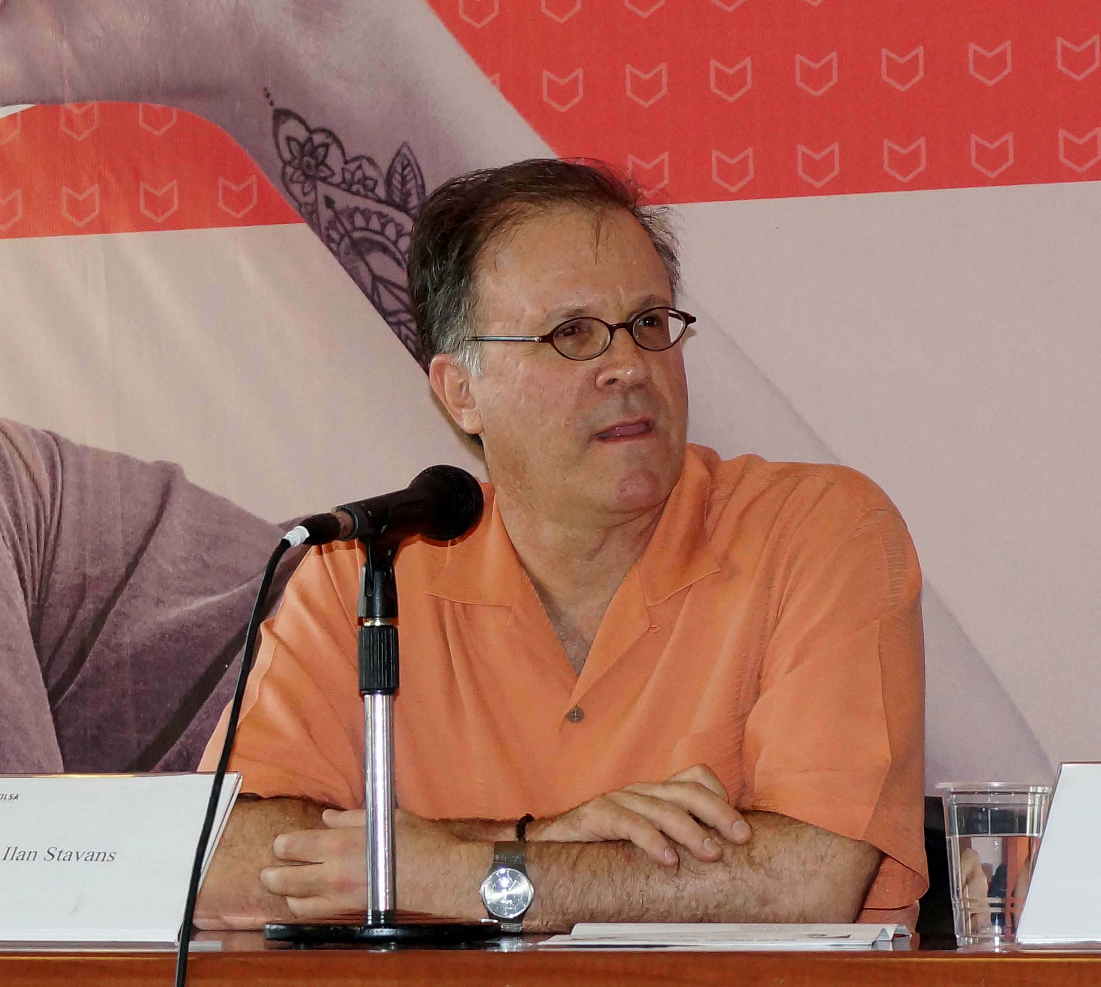 El lexicógrafo y escritor estadounidense Ilan Stavans en la Feria Internacional del Libro de Santiago 2017.